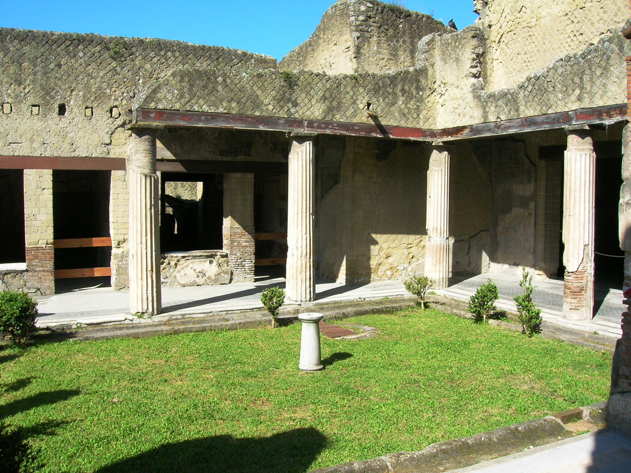 Casa del Salone Nero